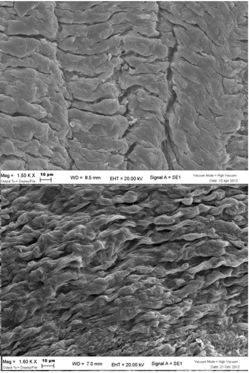 Sopra. Le cellule endoteliali di vena giugulare interna in soggetto sano, viste al microscopio elettronico a scansione a 1500x, dimostrano una regolarità ed un allineamento fra di loro coerente con la direzione del flusso. Sotto. Le cellule endoteliali di vena giugulare interna in un soggetto con CCSVI, viste al microscopio elettronico a scansione a 1500x, appaiono sollevate e dimostrano una evidente irregolarità specie se comparate con quelle dei soggetti di controllo sani.